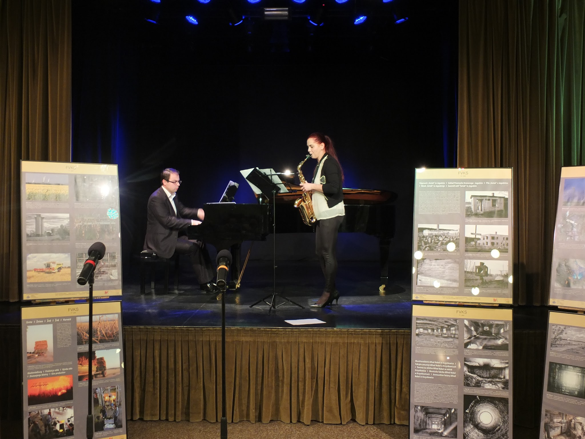 Prämierungsfeier des Fotowettbewerbs "Unterwegs" im Miejski Dom Kultury Zgorzelec